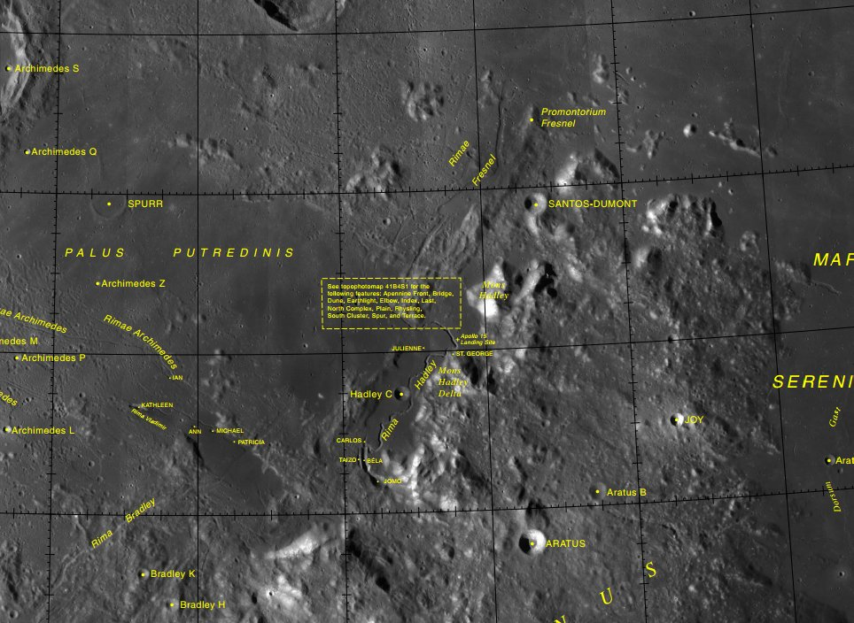 Cráter lunar Joy. Localización. (Imagen LRO)